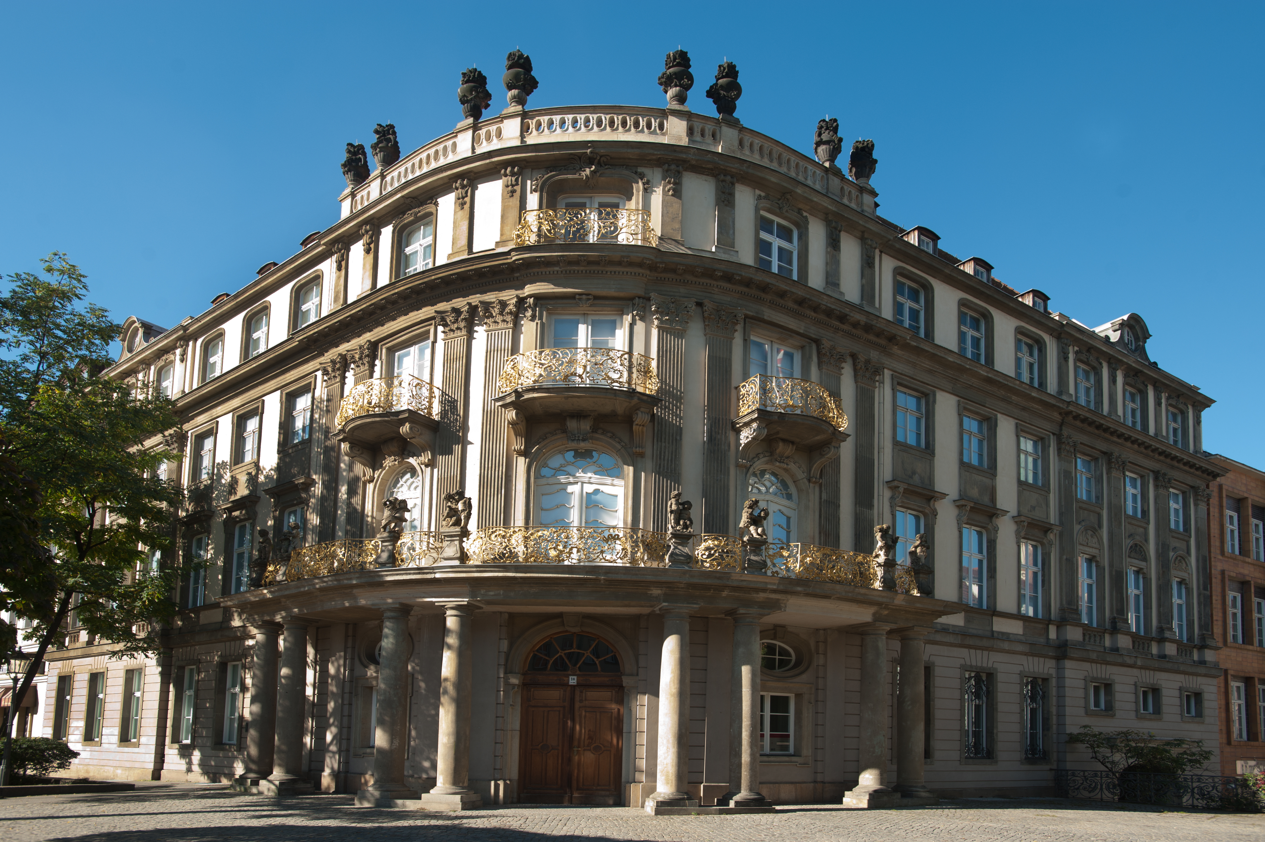 Foto: Oliver Ziebe